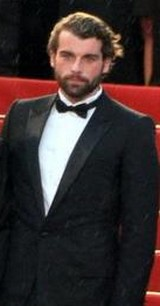 Stanley Weber au festival de Cannes